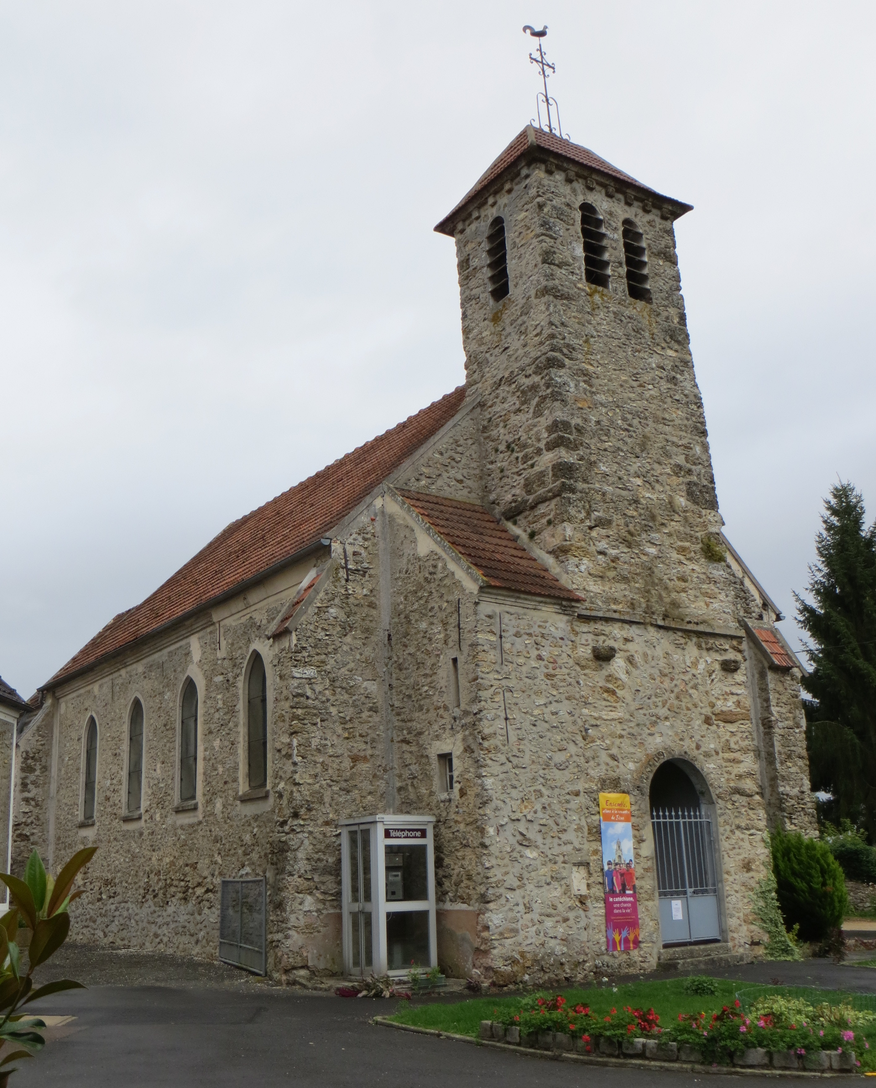 Vue de l'église